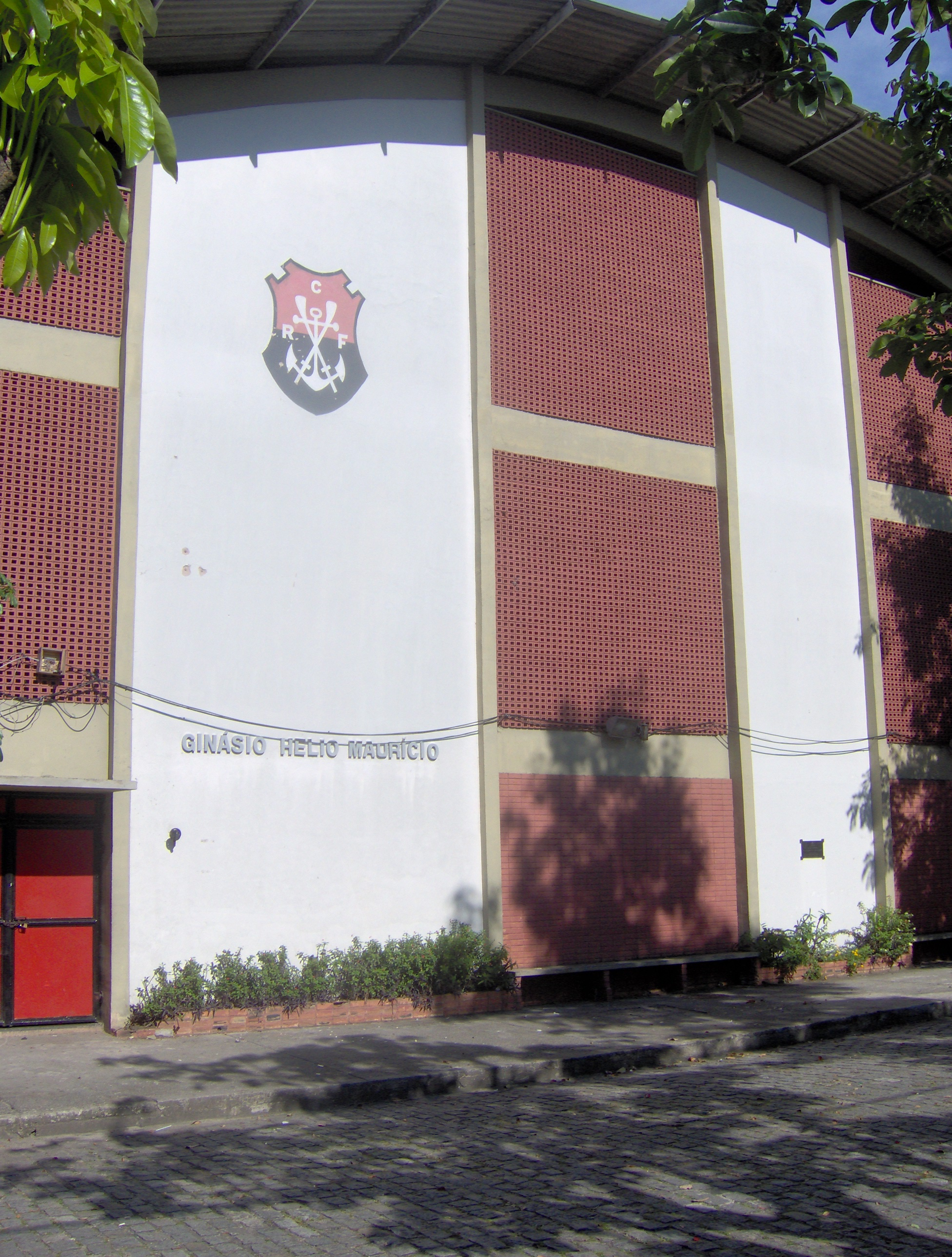 Ginásio Hélio Maurício, do Clube de Regatas do Flamengo, na Gávea, Rio de Janeiro, para partidas de basquete e voleibol.